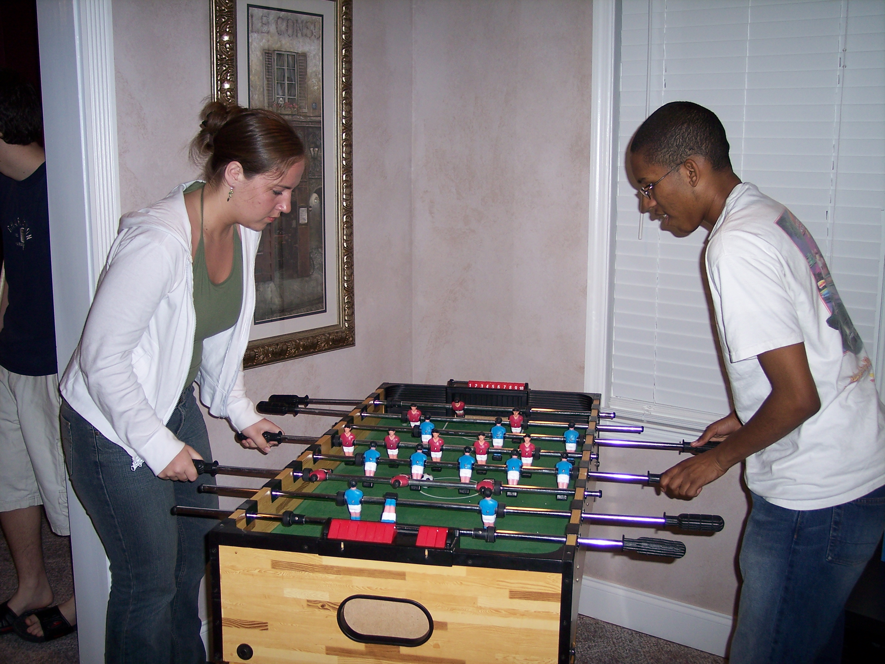 Tablofutbalo.